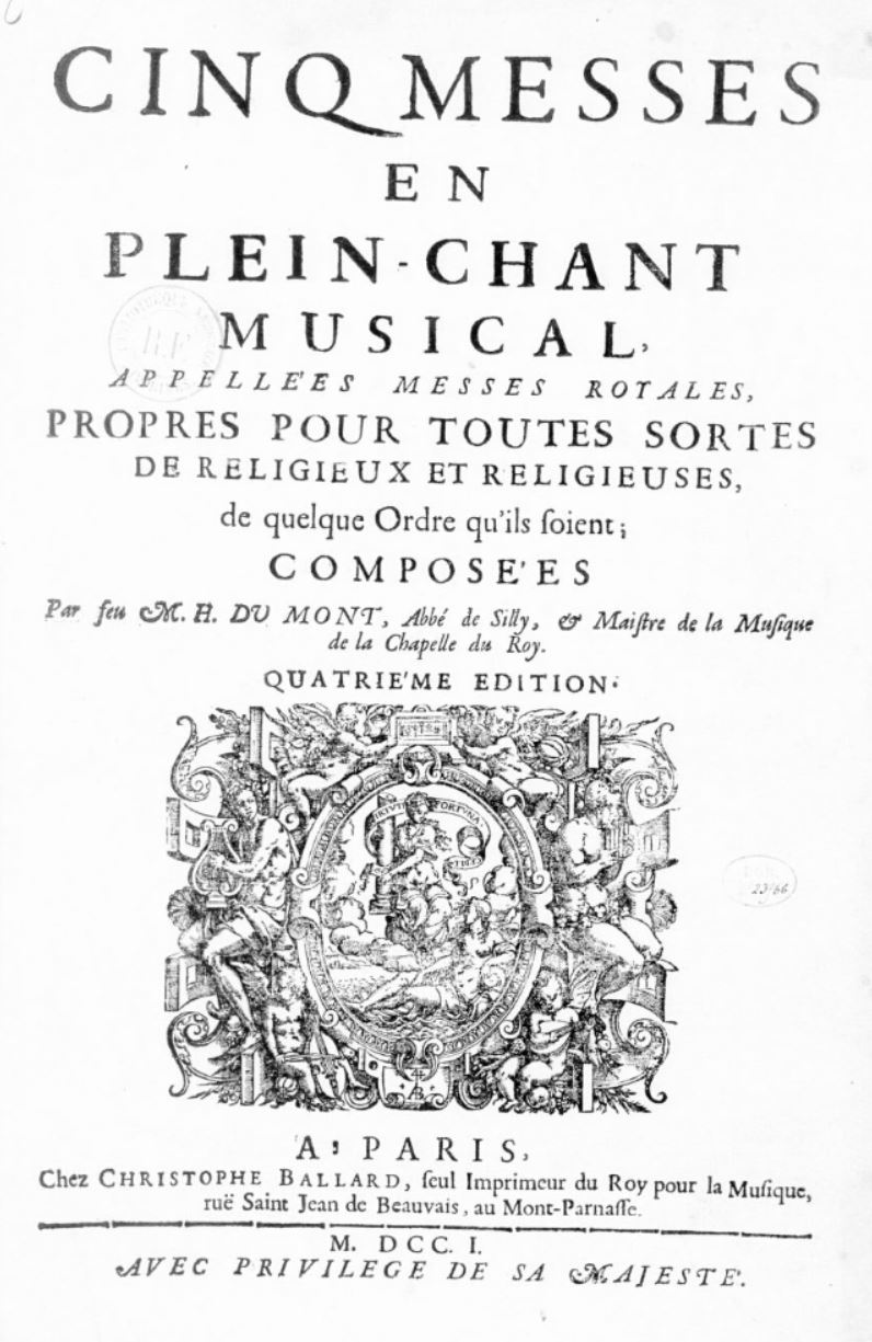 Title page of Henry Du Mont Messes (4th edition, 1701). Paris : Christophe Ballard, 1701. Paris BNF.